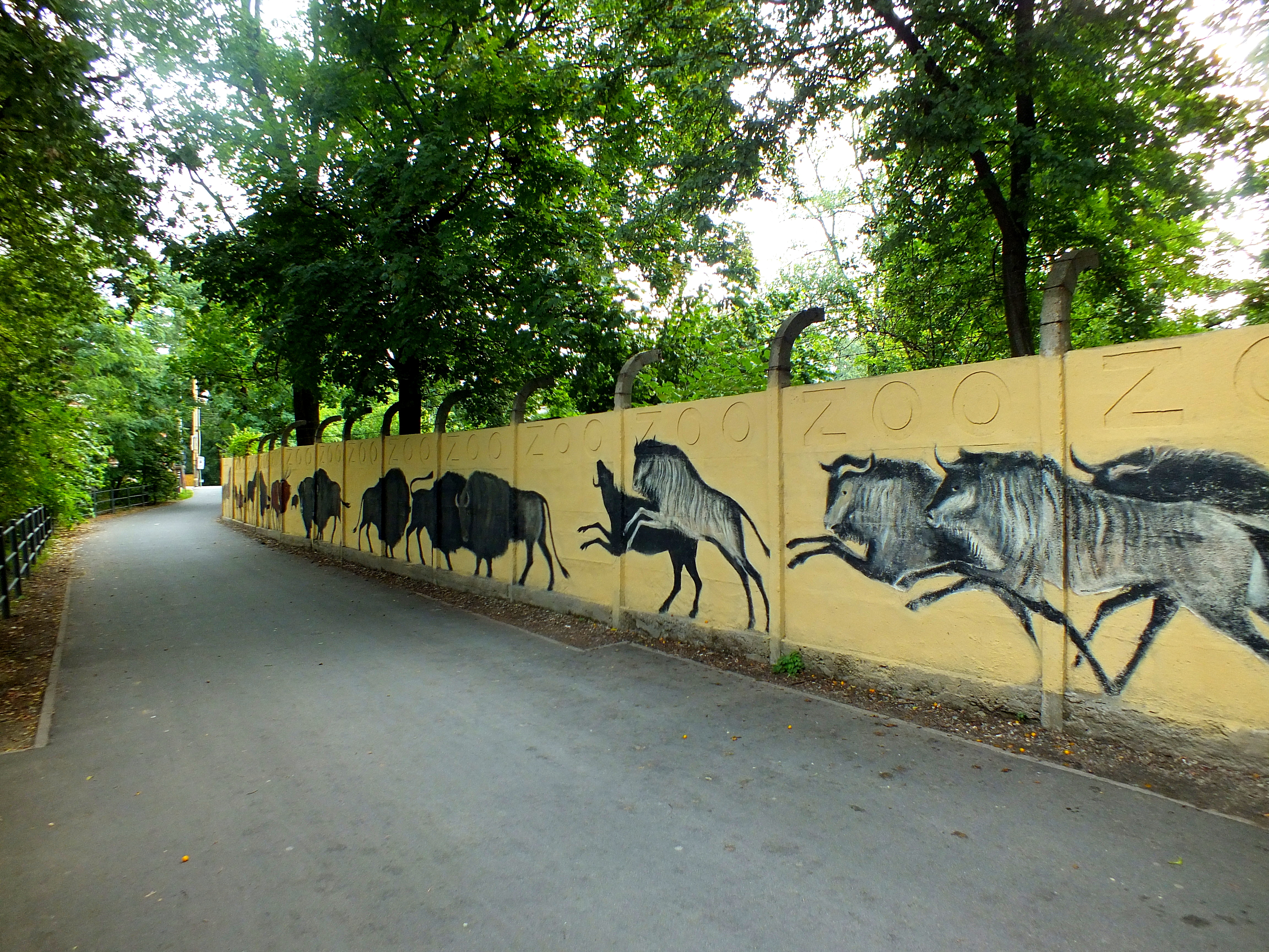 W 1977 r. na murze wrocławskiego zoo artysta Jerzy Wołoszynowicz namalował sylwetki dzikich zwierząt. W 2017 r. w ramach programu Przestrzenie dla Pięknej Europejskiej Stolicy Kultury odnowiono mural. Przy odtworzeniu muralu zaangażowała się Jagoda Łagiewska (absolwentka ASP i studentka historii sztuki na UWr.), która do prac renowacyjnych zmobilizowała kilkudziesięciu młodych artystów. Obiekt o długości 350 metrów przywrócono do dawnego stanu dzięki bezinteresownej pomocy mieszkańców Wrocławia.